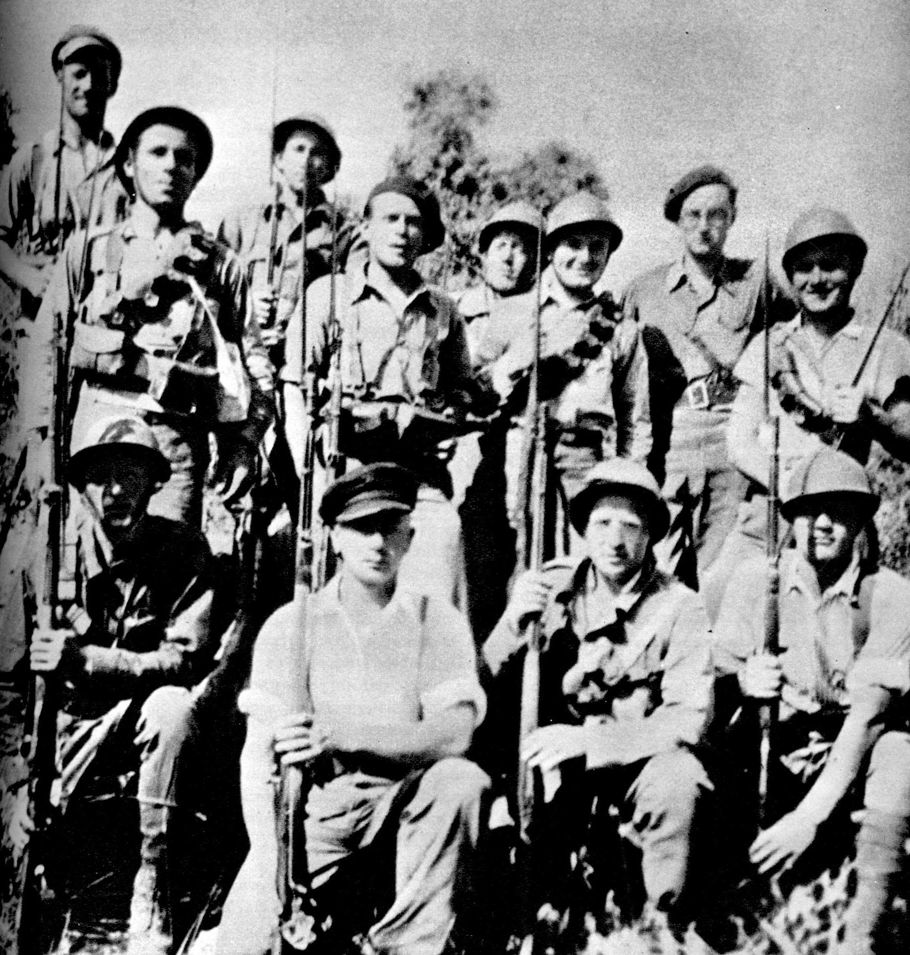 Srpskohrvatski / српскохрватски: Grupa Slovenaca iz čete »Matija Gubec« uoči ofanzive na Brunete početkom jula 1937. godine. Među ostalima stoji Aleš Bebler (drugi s desna)